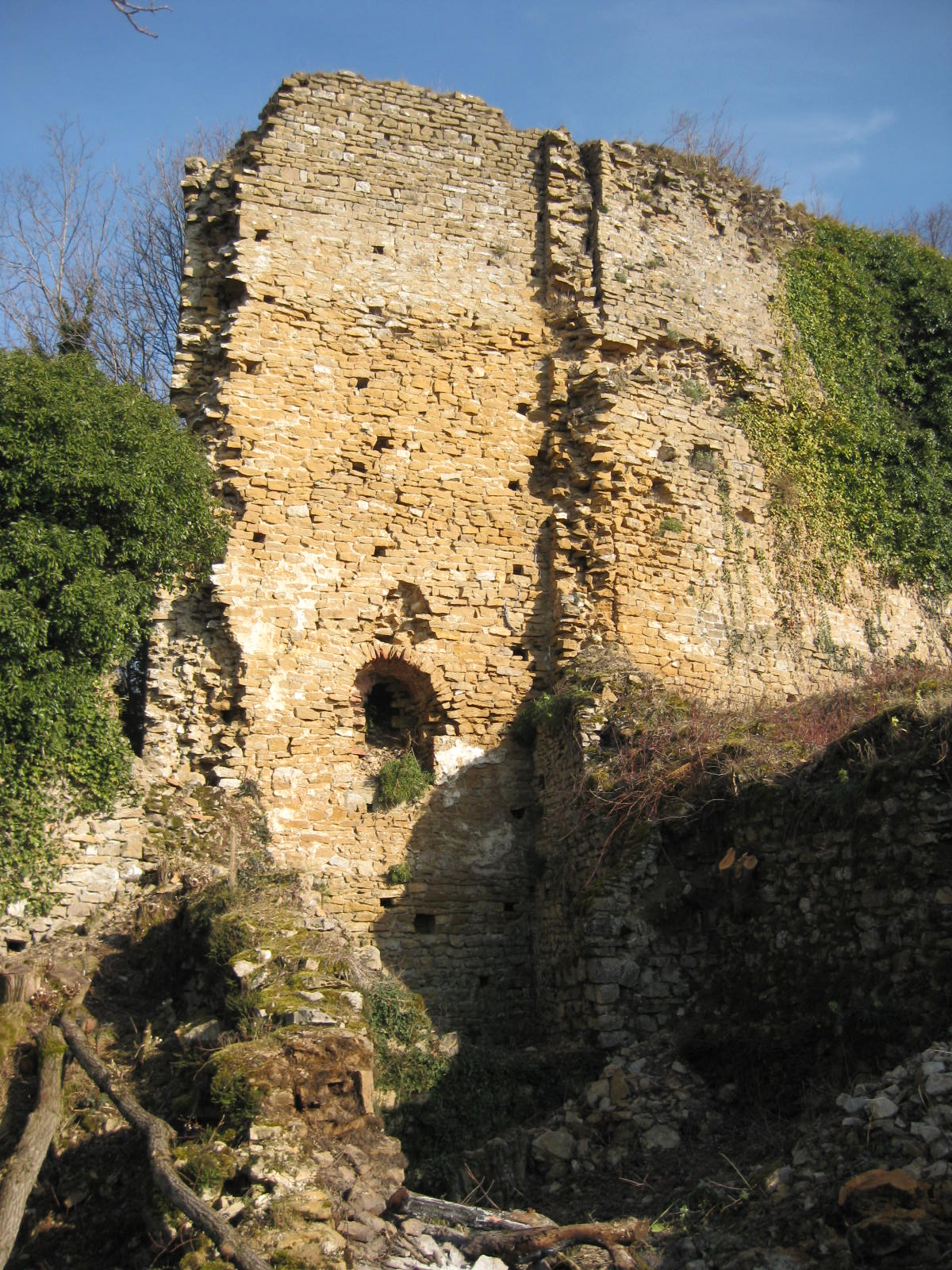 Emplacement de la chapelle du château, au Nord du grand mur.